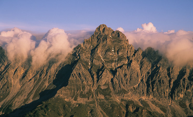 Die Zimba, umgeben von Nebelschwaden